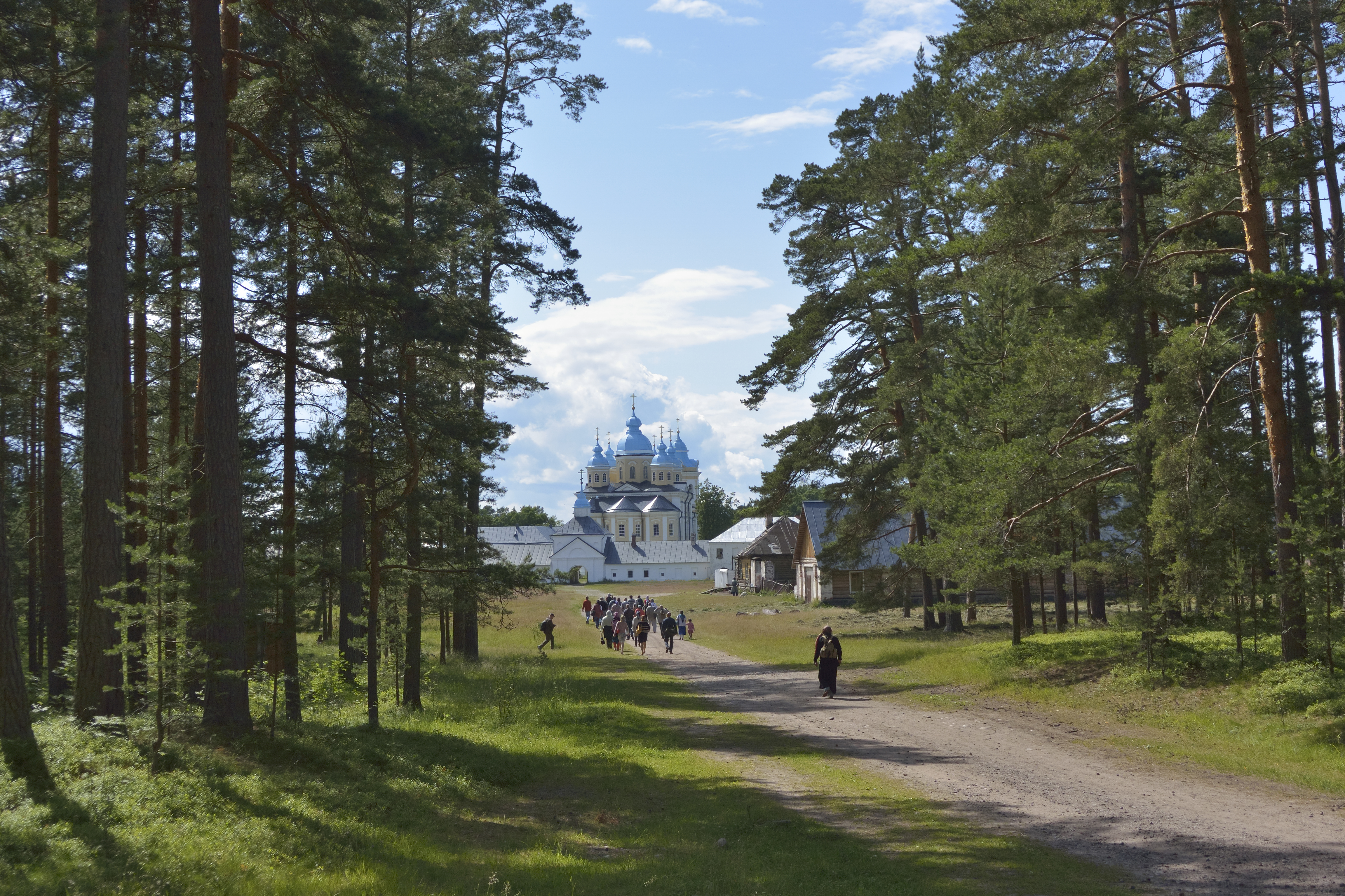 Монастырь Рождественский Коневецкий: о.Коневец, Приозерский район, Ленинградская область